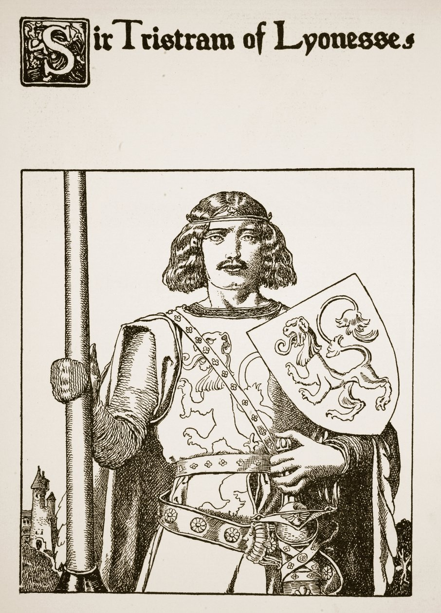 Sir Tristram of Lyonesse